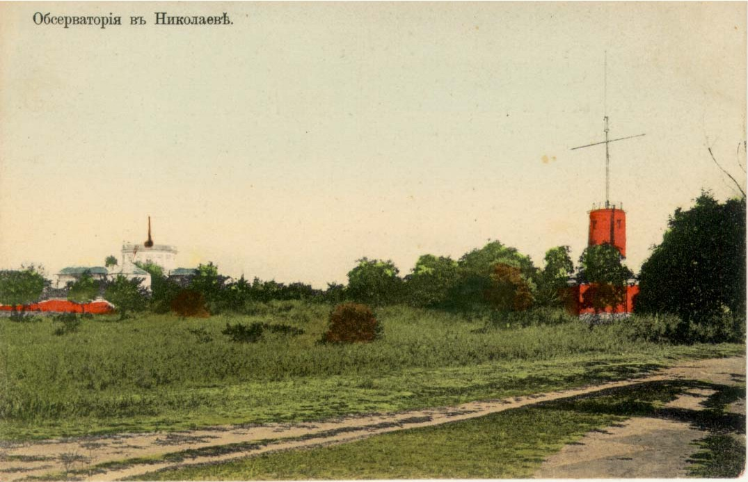 «Обсерваторія въ Николаевѣ.»